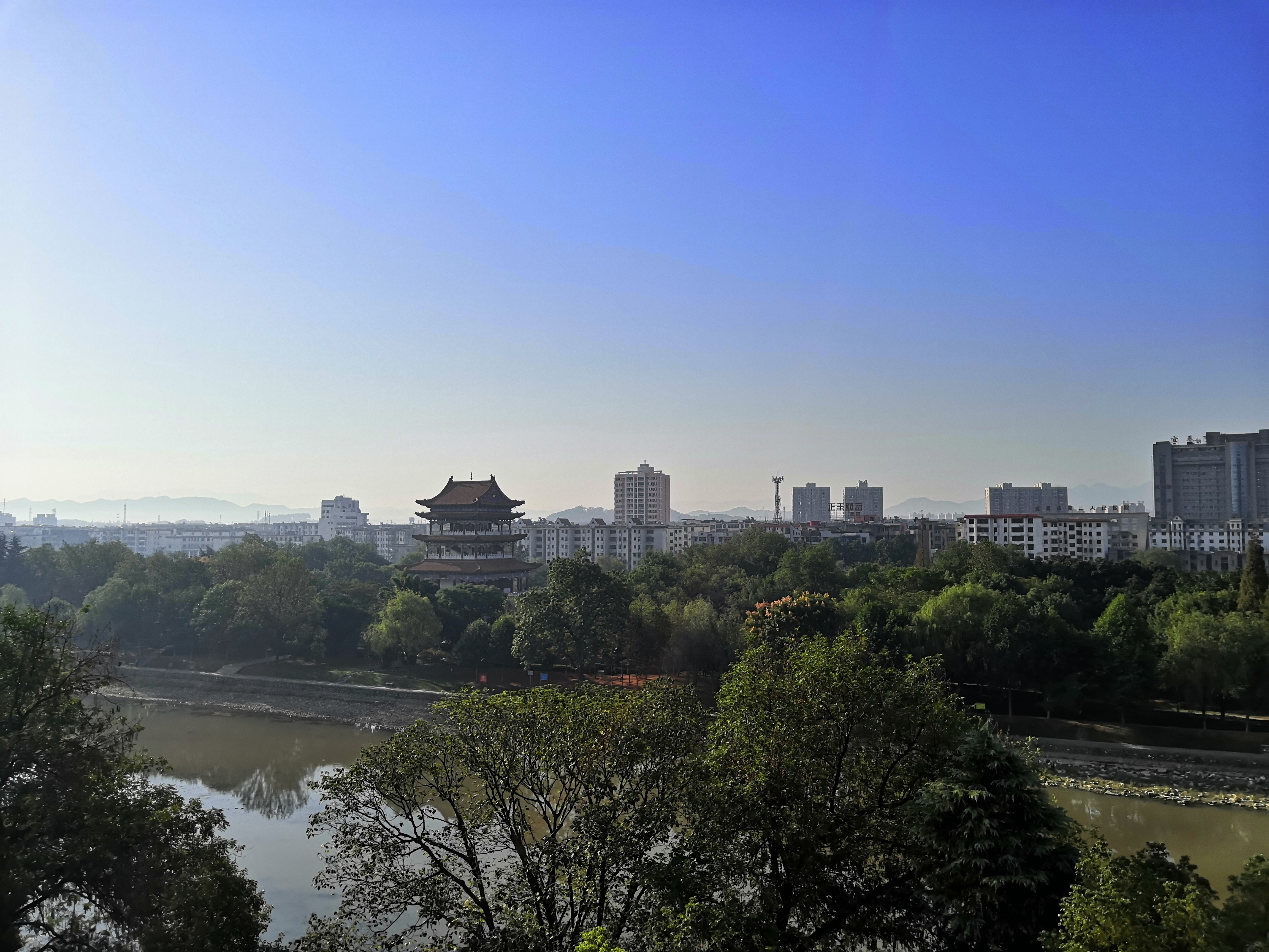 中文（中国大陆）: 状元阁与状元洲